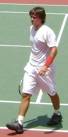 Tenista brasileiro Nicolas Santos, no Aberto de São Paulo de Tênis.